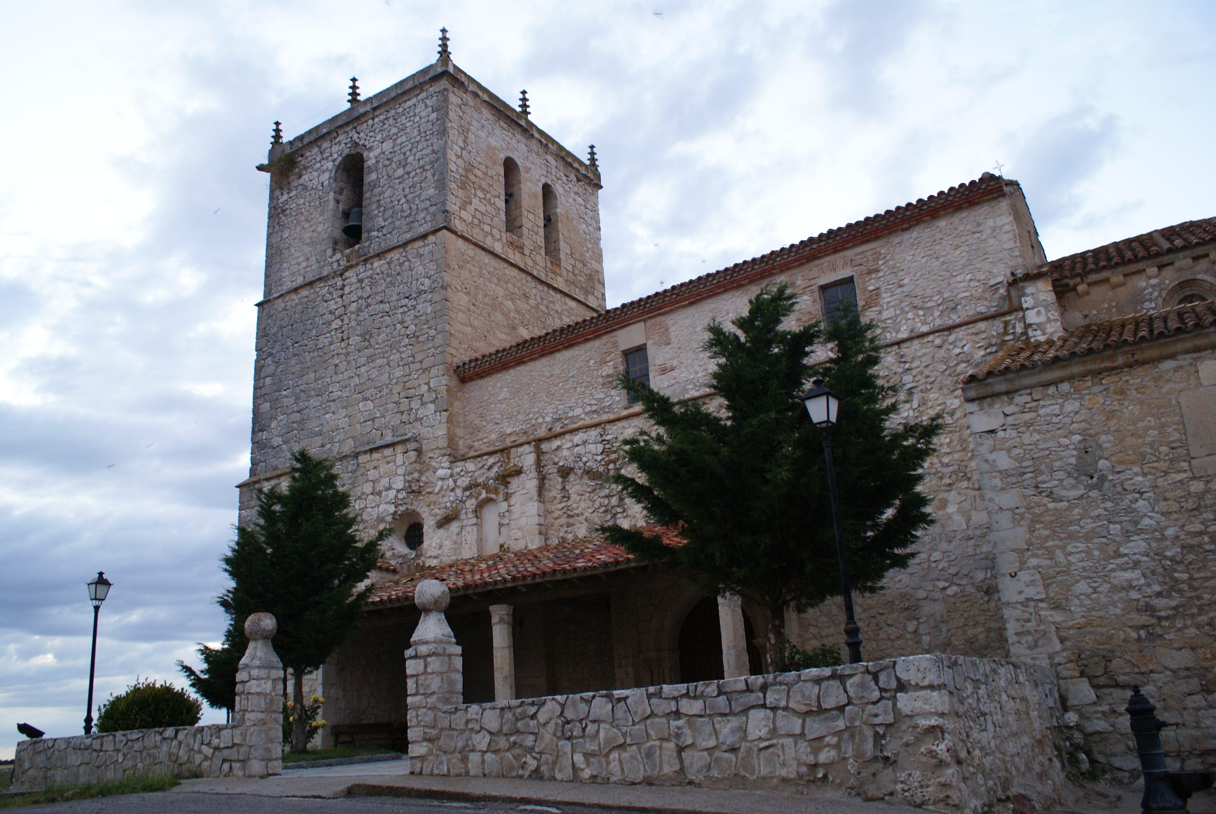 Iglesia de Nª Señora de la Asunción de Canalejas de Peñafiel.